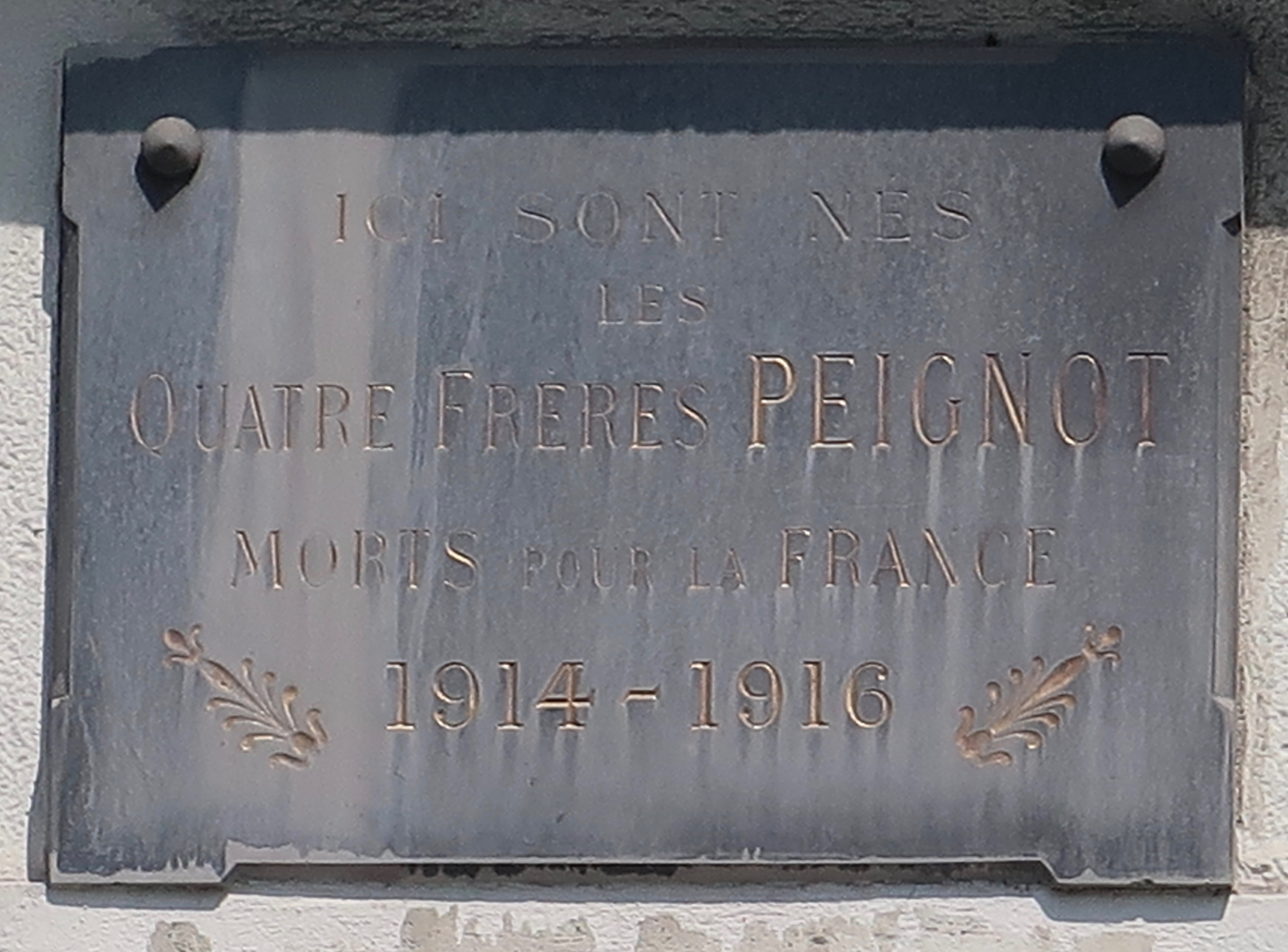 Plaque en hommage aux frères Peignot, 68 boulevard Edgar-Quinet (Paris 14e).